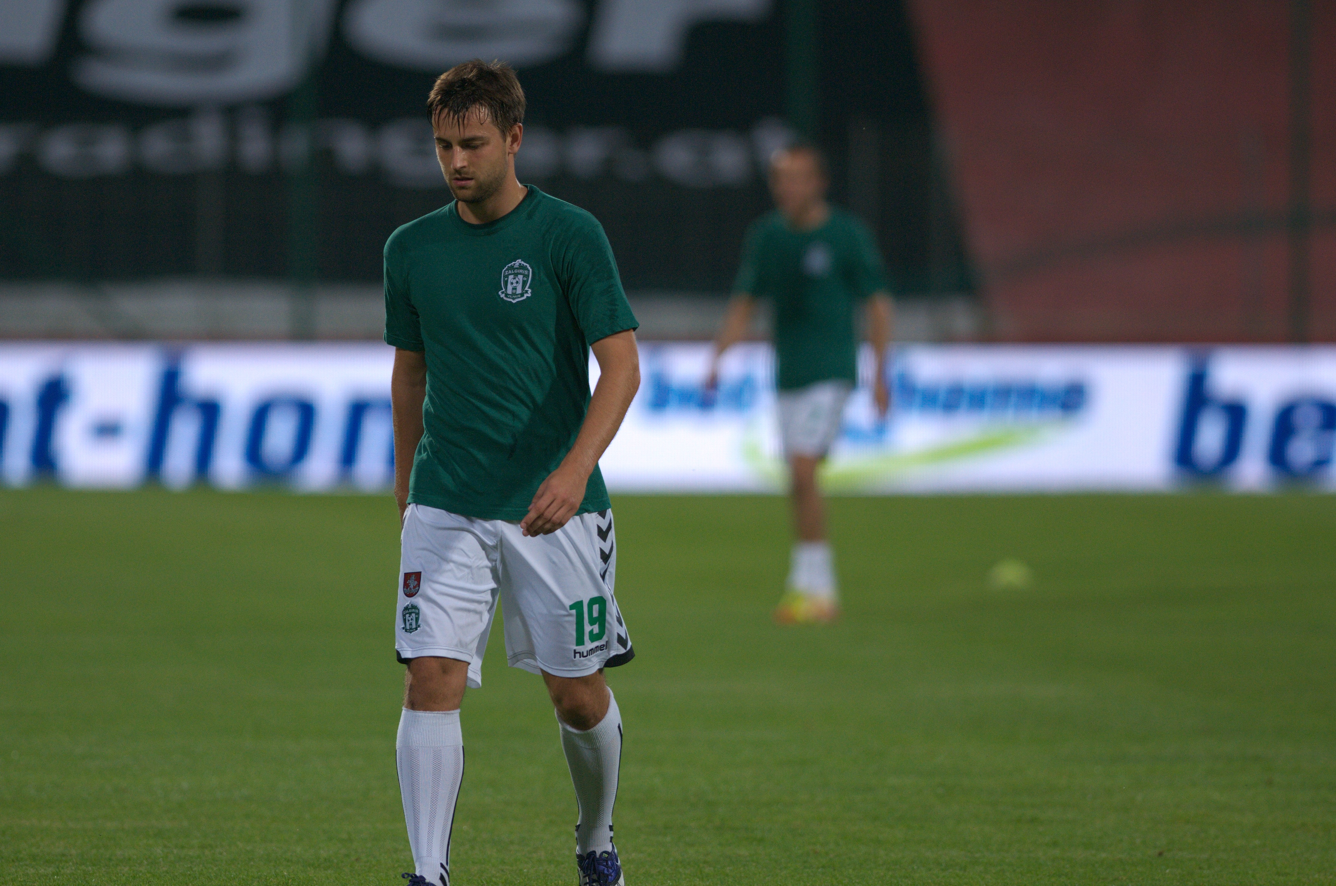 Zalgiris-Spieler Kamil Bilinski beim Europa-League-Qualifikationsspiel gegen Admira